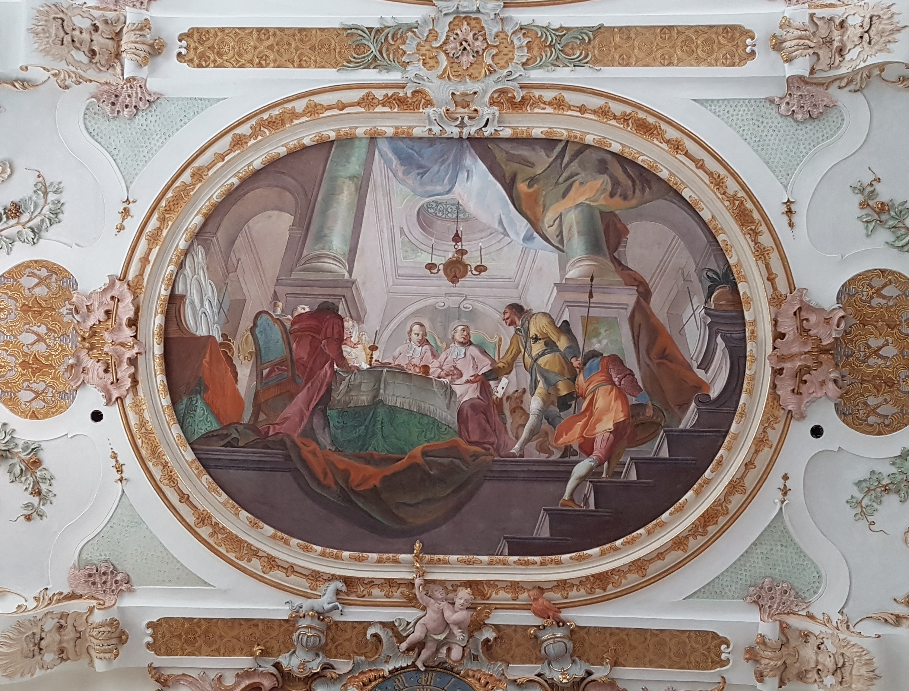 St. Ulrich (Eresing), Fresko "Das Fischwunder" am Langhausgewölbe